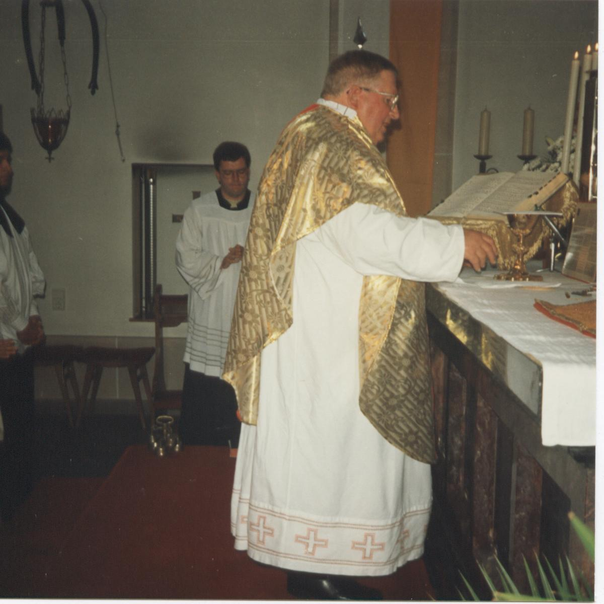 Pfarrer Raymond Arnette, Bistum Speyer